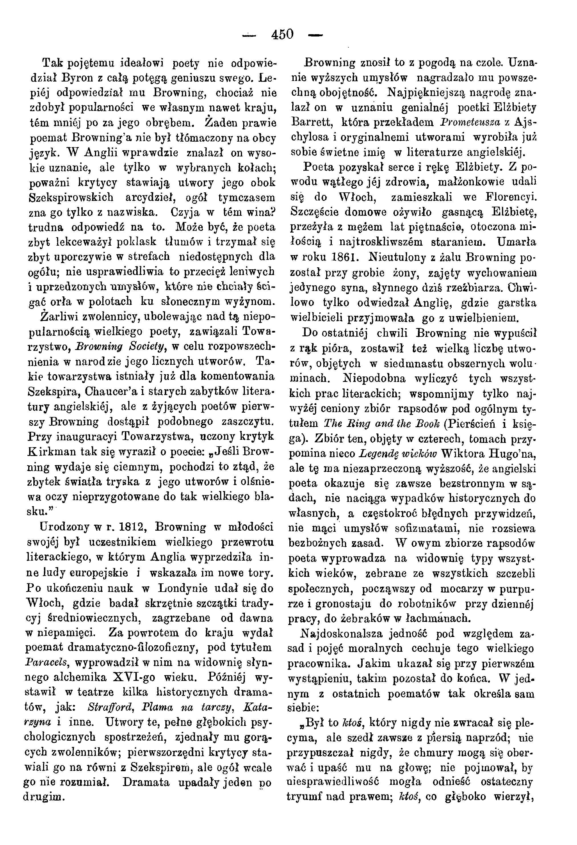 artykuł "Robert Browning" Kronika Rodzinna. Pismo dwutygodniowe 1890 nr15